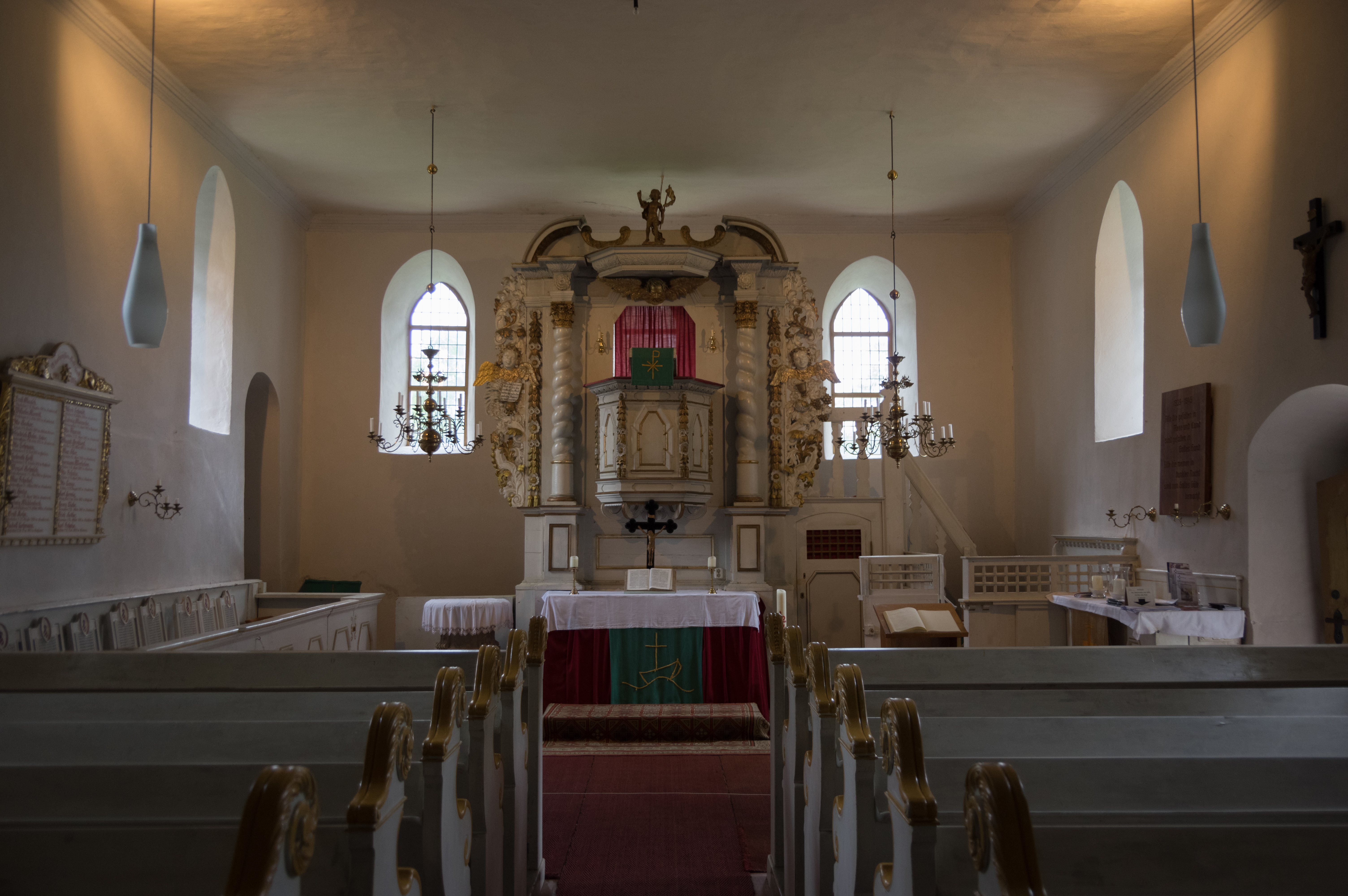 Schwedt/Oder, Ortsteil Criewen in Brandenburg. Die Kirche steht unter Denkmalschutz. Nach dem Dreißigjährigen Krieg wurde die Kirche wieder aufgebaut. Turm und Stufengiebel wurden 1830 hinzugefügt.